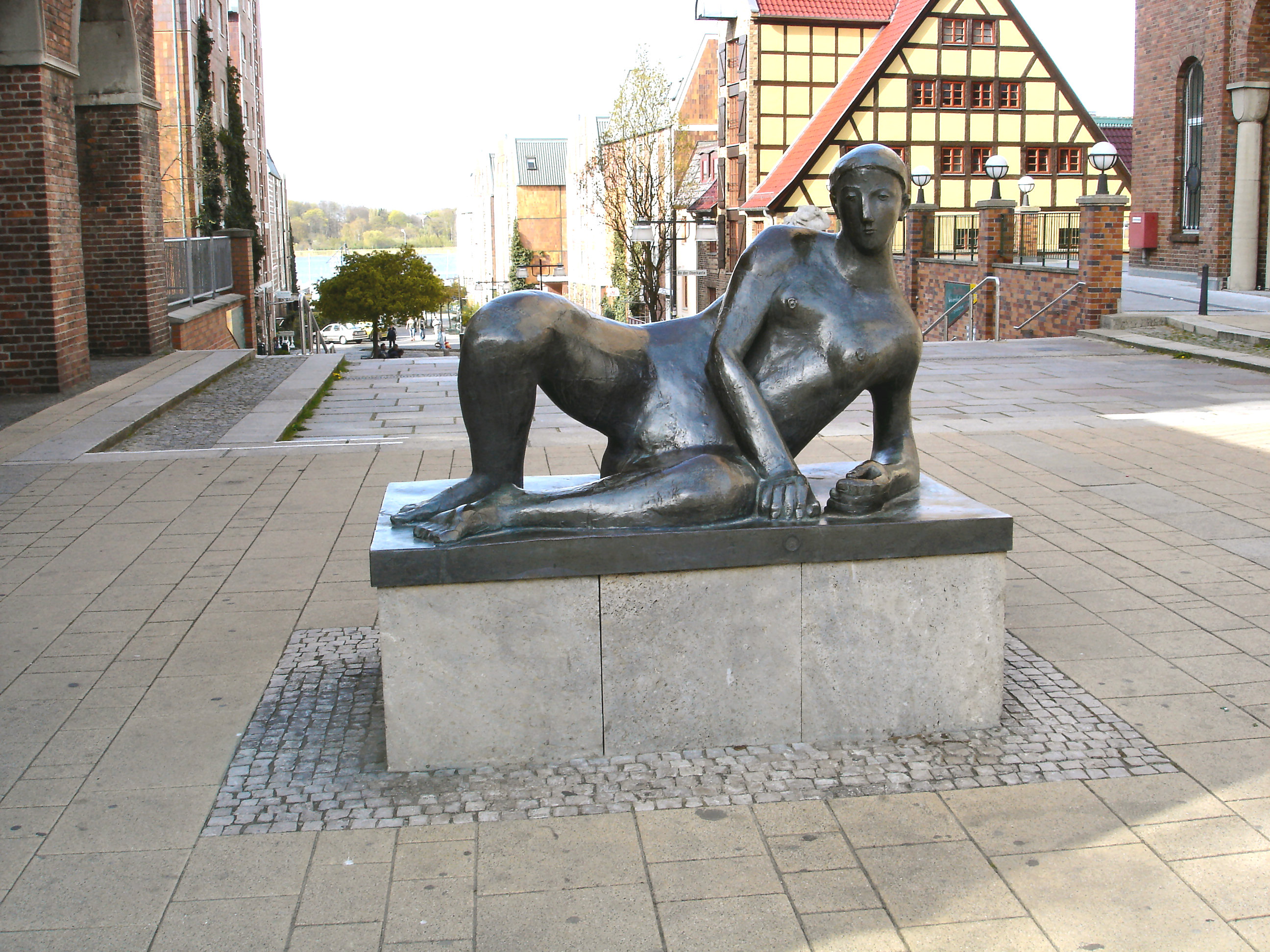 Bronzefigur "Die Liegende" von Reinhard Buch in Rostock / Sculpture "Lying Woman" of Reinhard Buch in Rostock